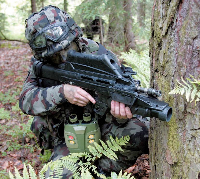 Pripadnik Slovenske vojske